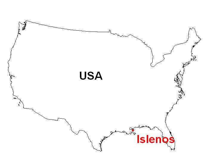 Islenos